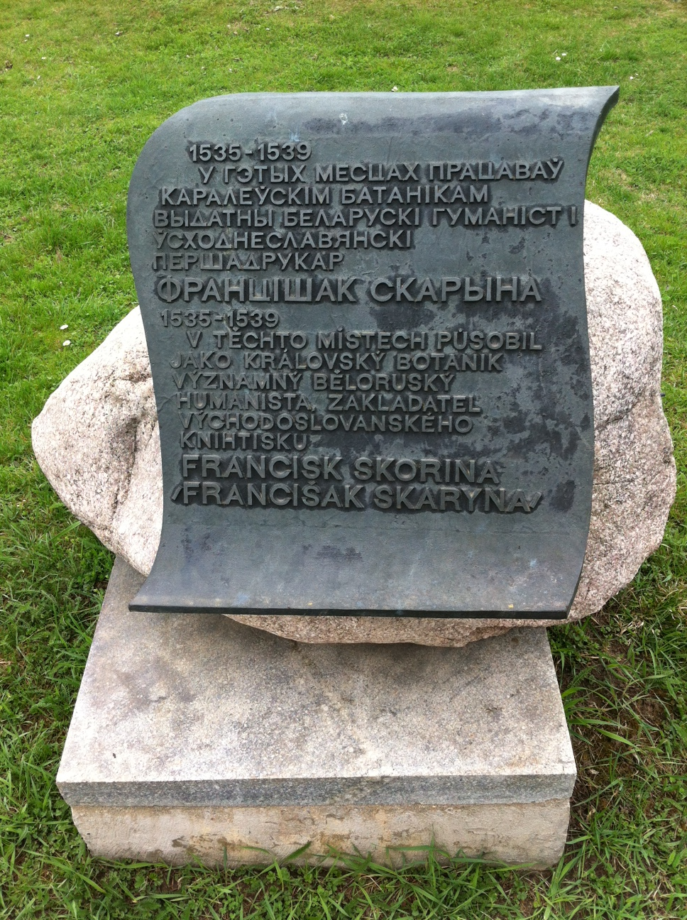 Skaryna